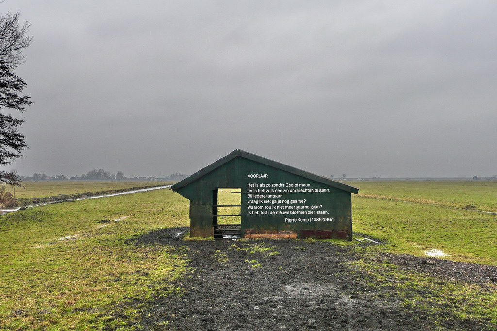 Schuurtje in Warder (Gemeente Zeevang), Noord-Holland (Nederland). Gedicht "Voorjaar" door Pierre Kemp